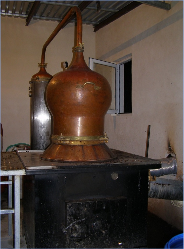 Destillier-Anlage für Raki in Spili, Kreta